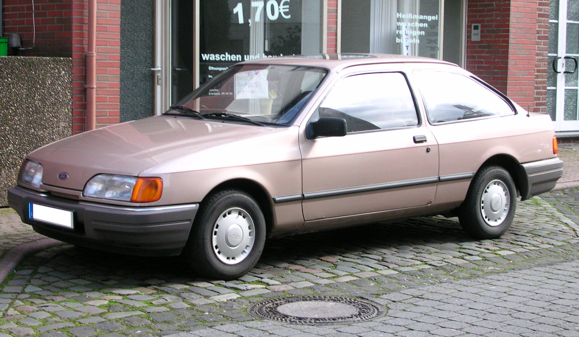 Ford Sierra CLX, Baujahr vor 1990 (wegen der helleren Rückleuchten, orangenen Blinker und des schmalen Schlitzes ohne Kühlergrill). Die zweitürige Variante ist relativ selten.